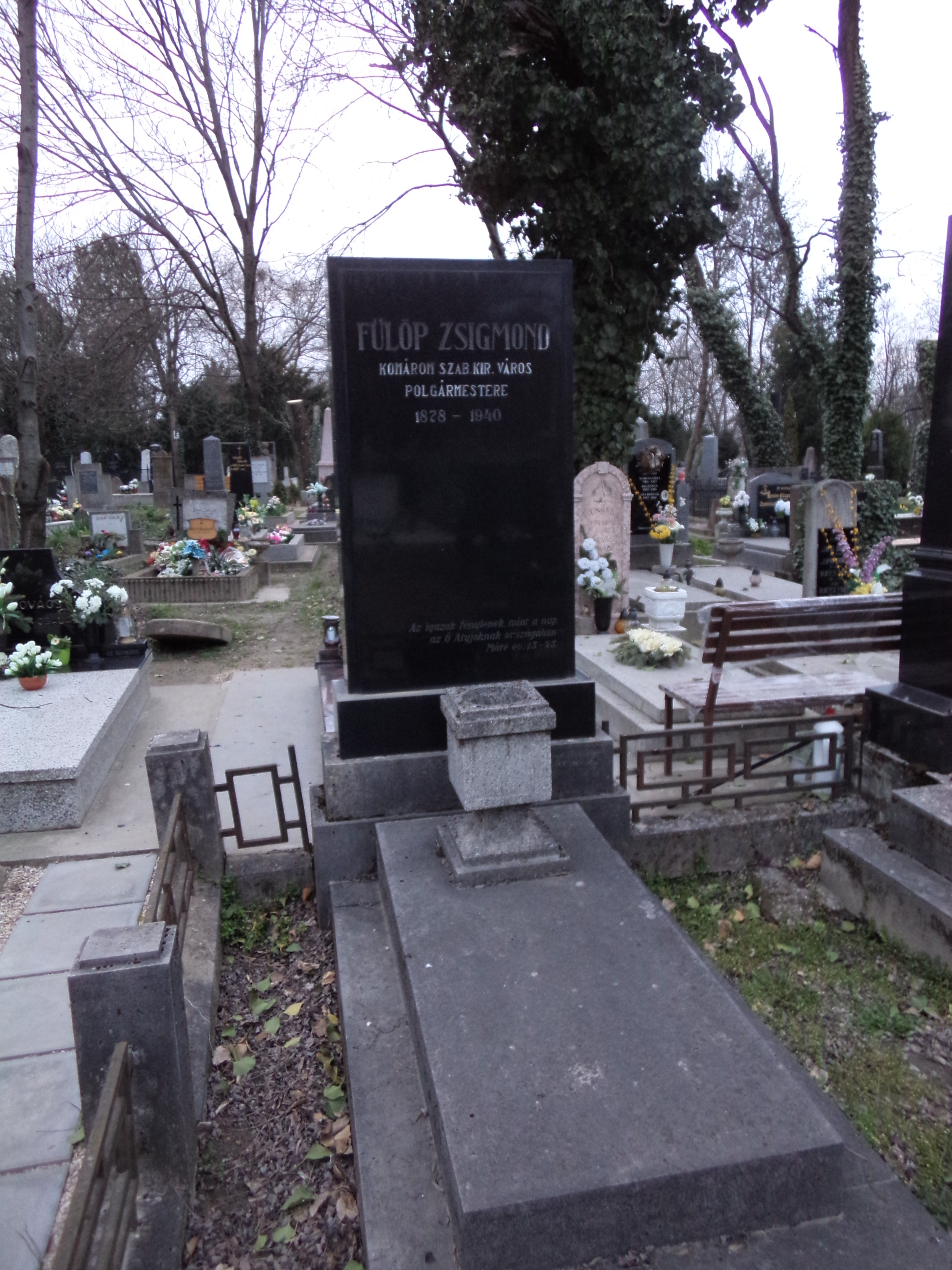 Fülöp Zsigmond - Komáromi temető